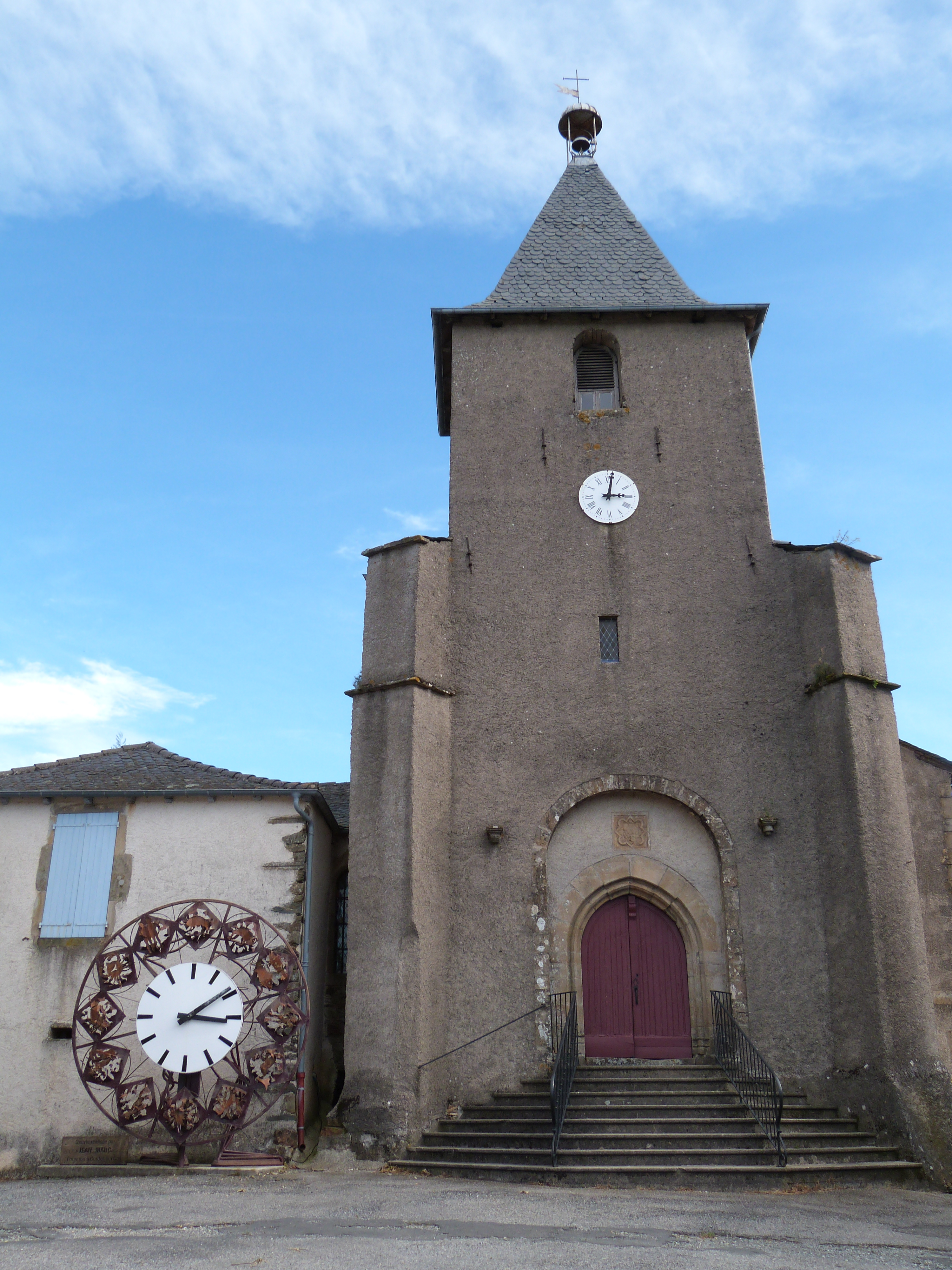 Église de Saint-André